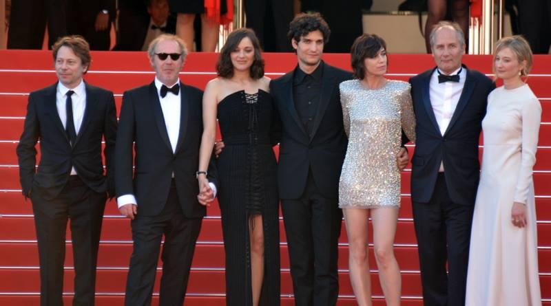 Mathieu Amalric, Arnaud Desplechin, Marion Cotillard, Louis Garrel, Charlotte Gainsbourg, Hyppolite Girardot et Alba Rohrwacher lors de la présentation du film "Les Fantômes d'Ismaël" au festival de Cannes.